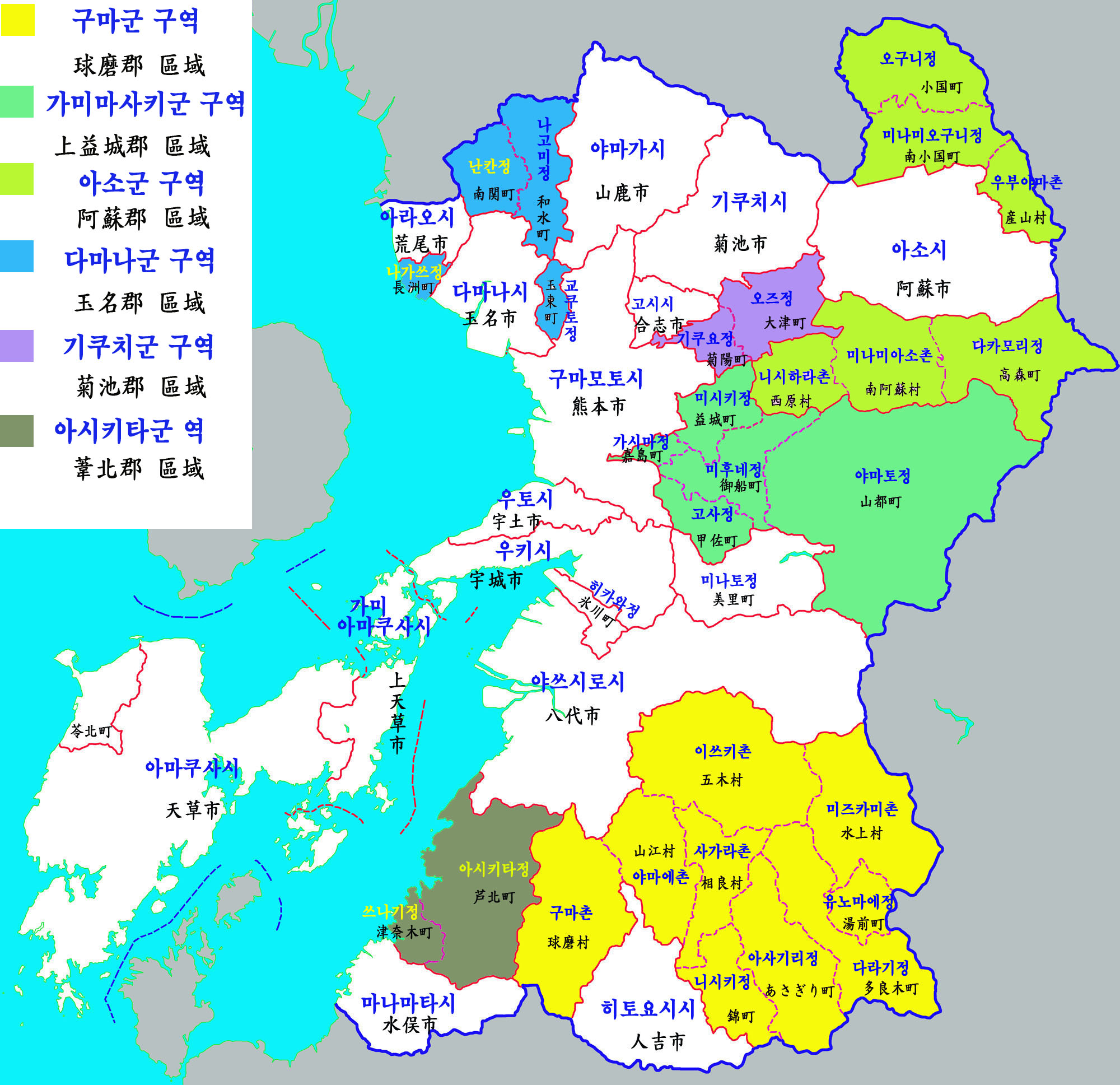 구마모토현 행정구역